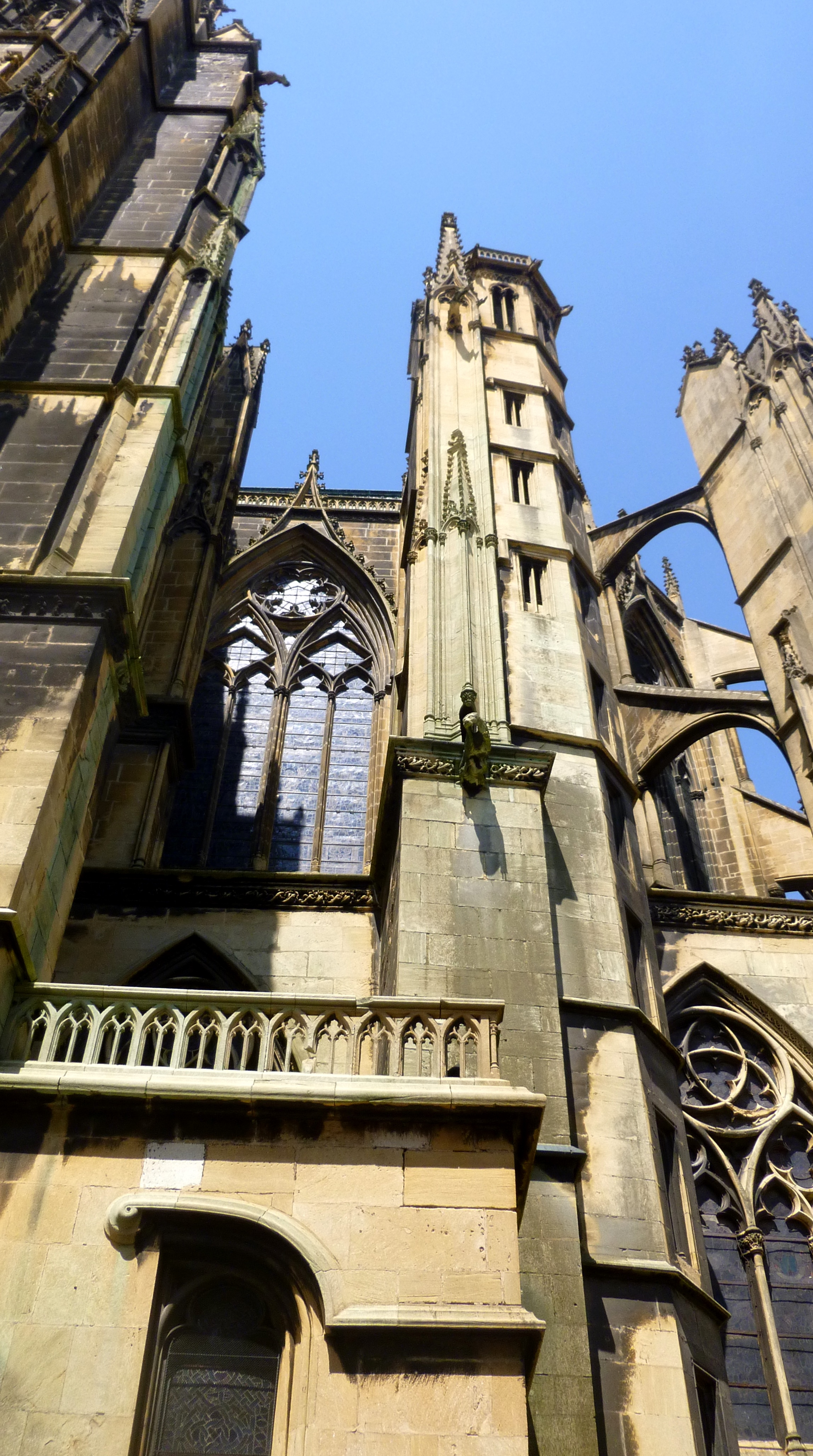 Tour du chevet (XVIe siècle) de la cathédrale de Metz.